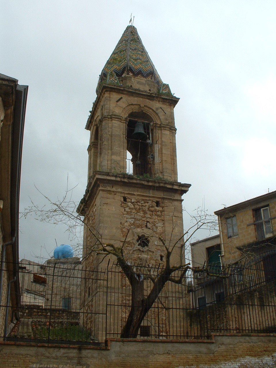 Mazzarino, campanile della Chiesa del SS. Crocifisso dell’Olmo.